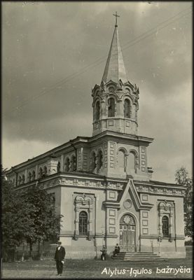 Alytaus Šv. Kazimiero bažnyčia tarpukariu